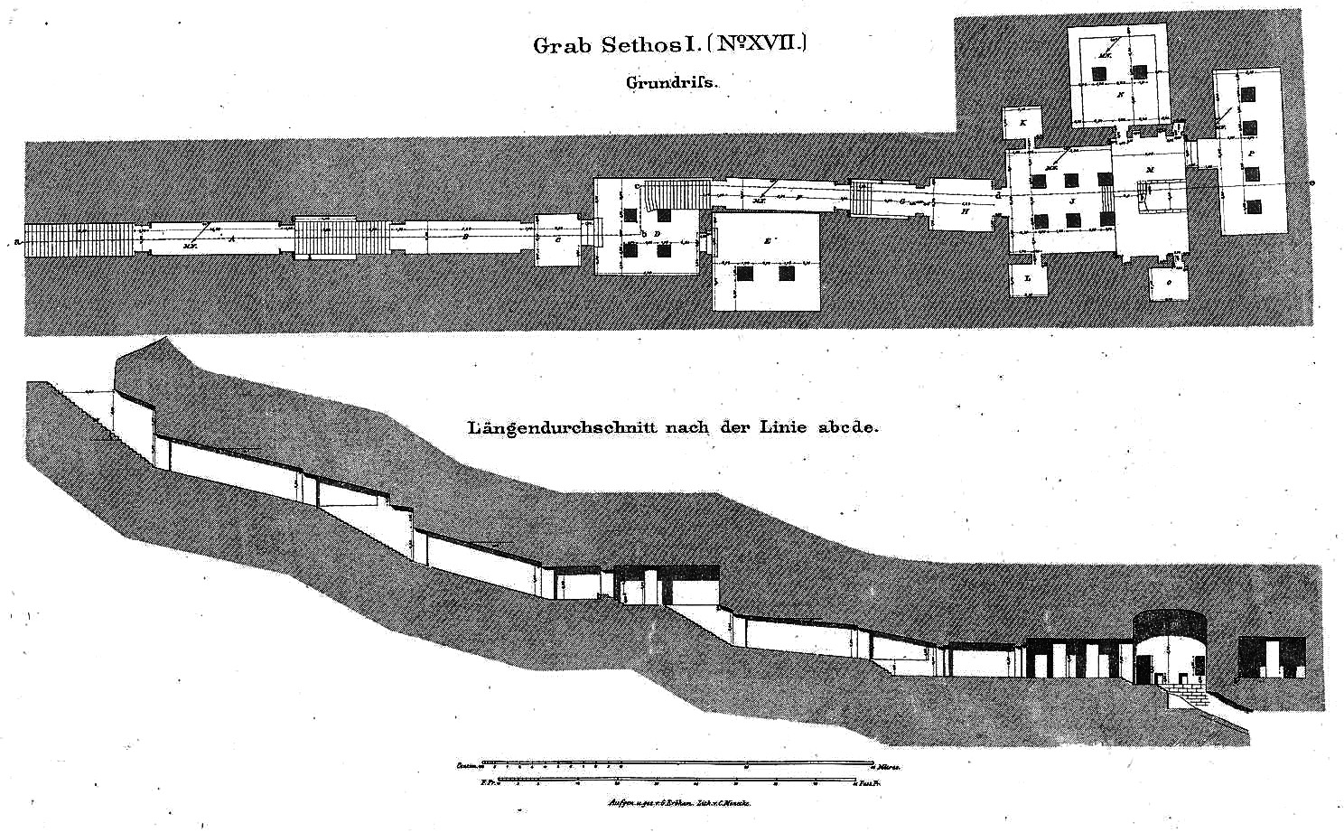 Imatge retocada del dibuix de Lepsius. Només la part inferior de la pàgina.